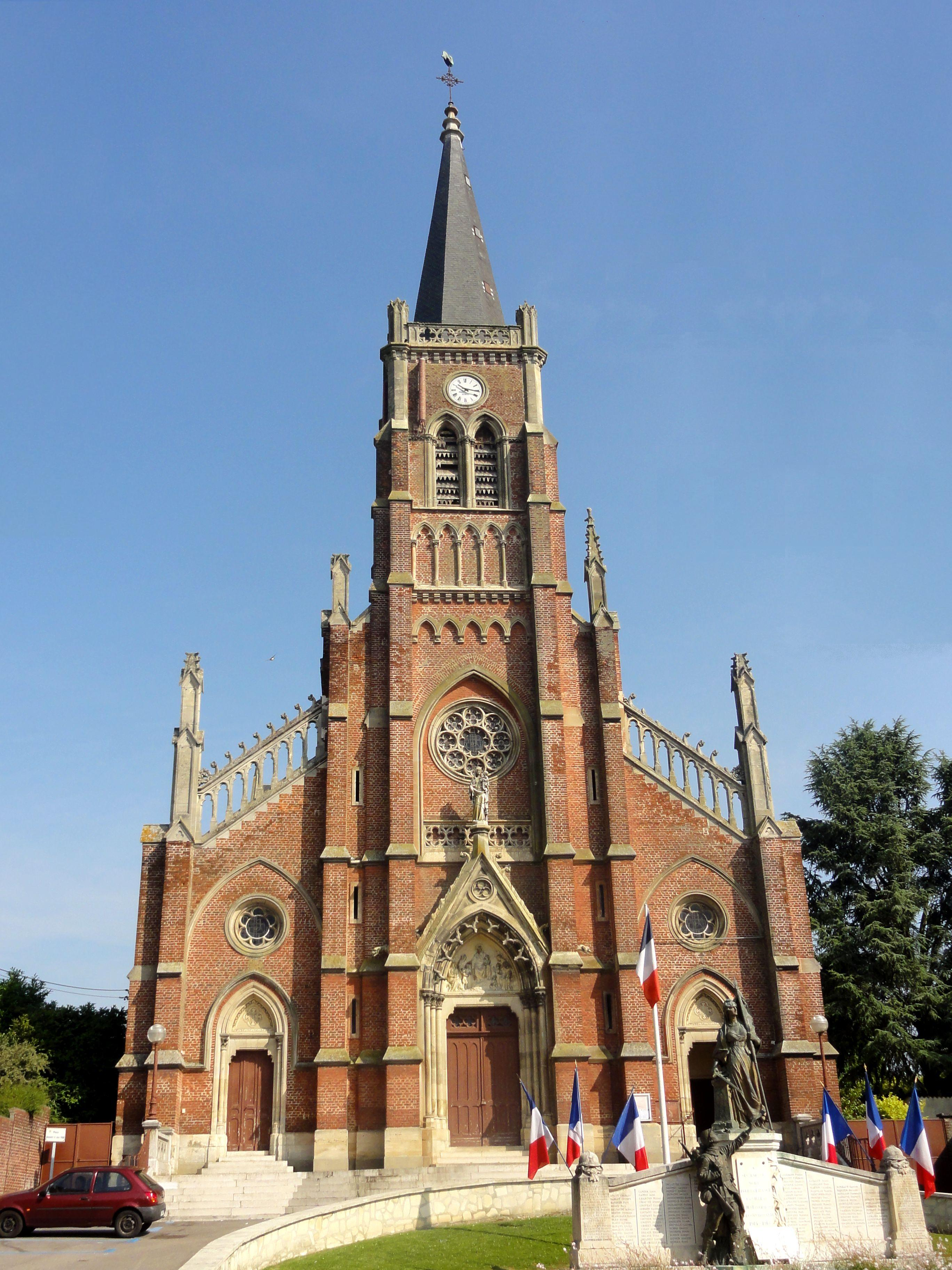 Église néogothique Saint-Just, façade.